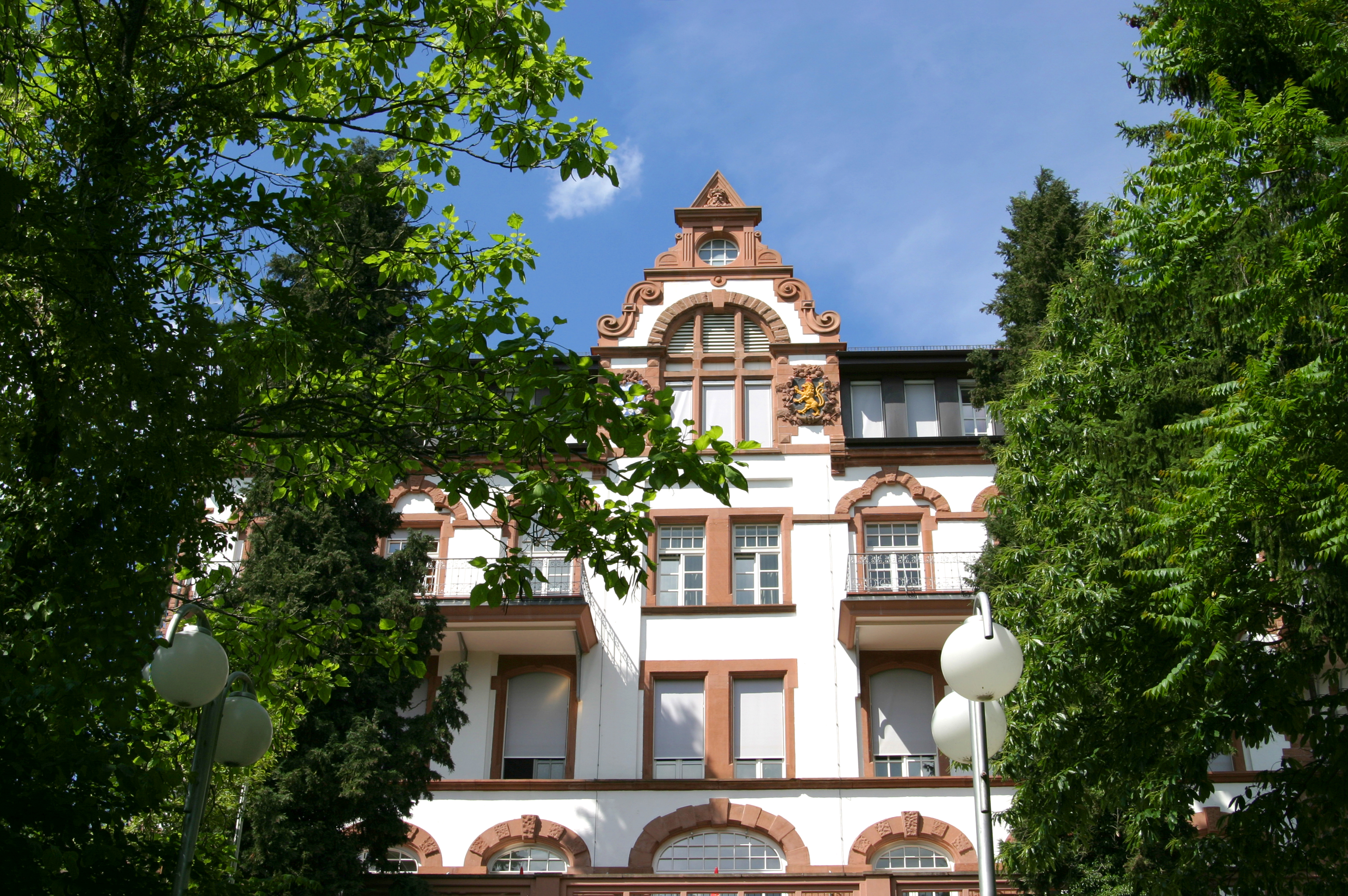 Fassade der Fachklinik eußerthal